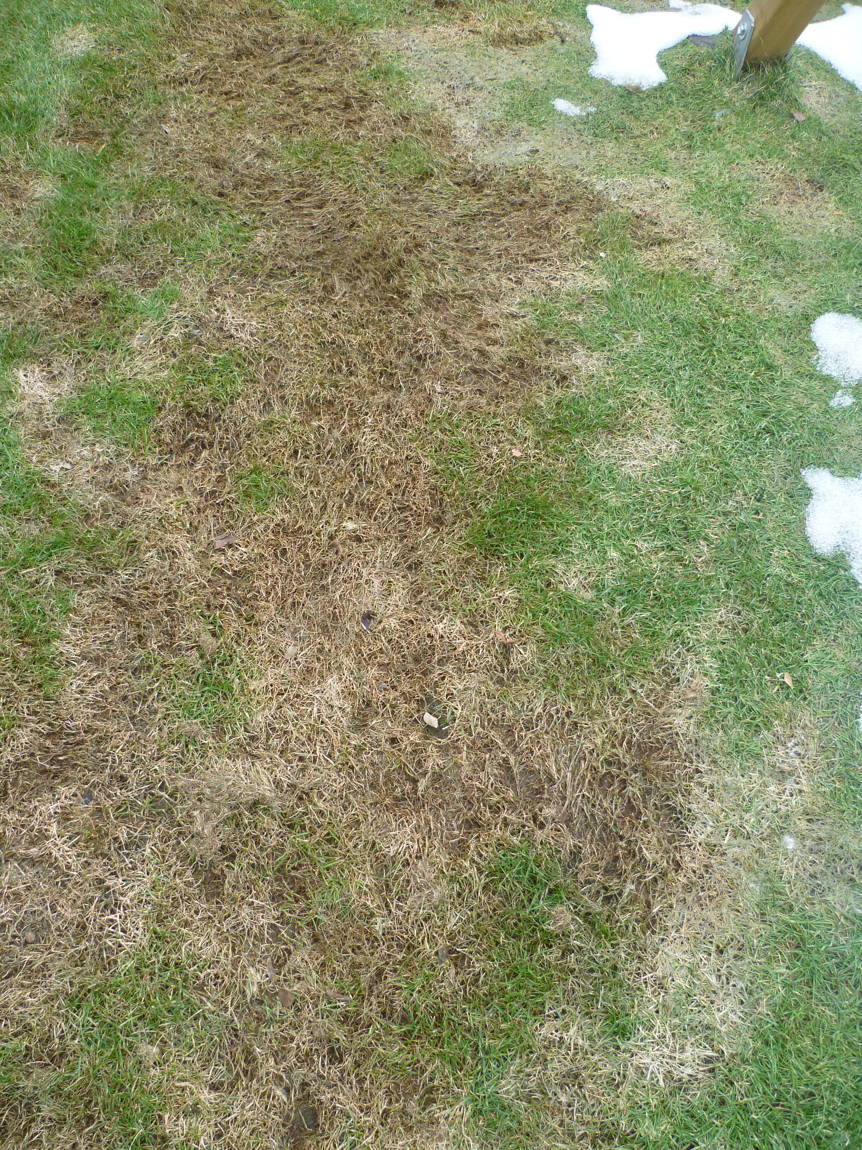 Schneeschimmel Fernaufnahme